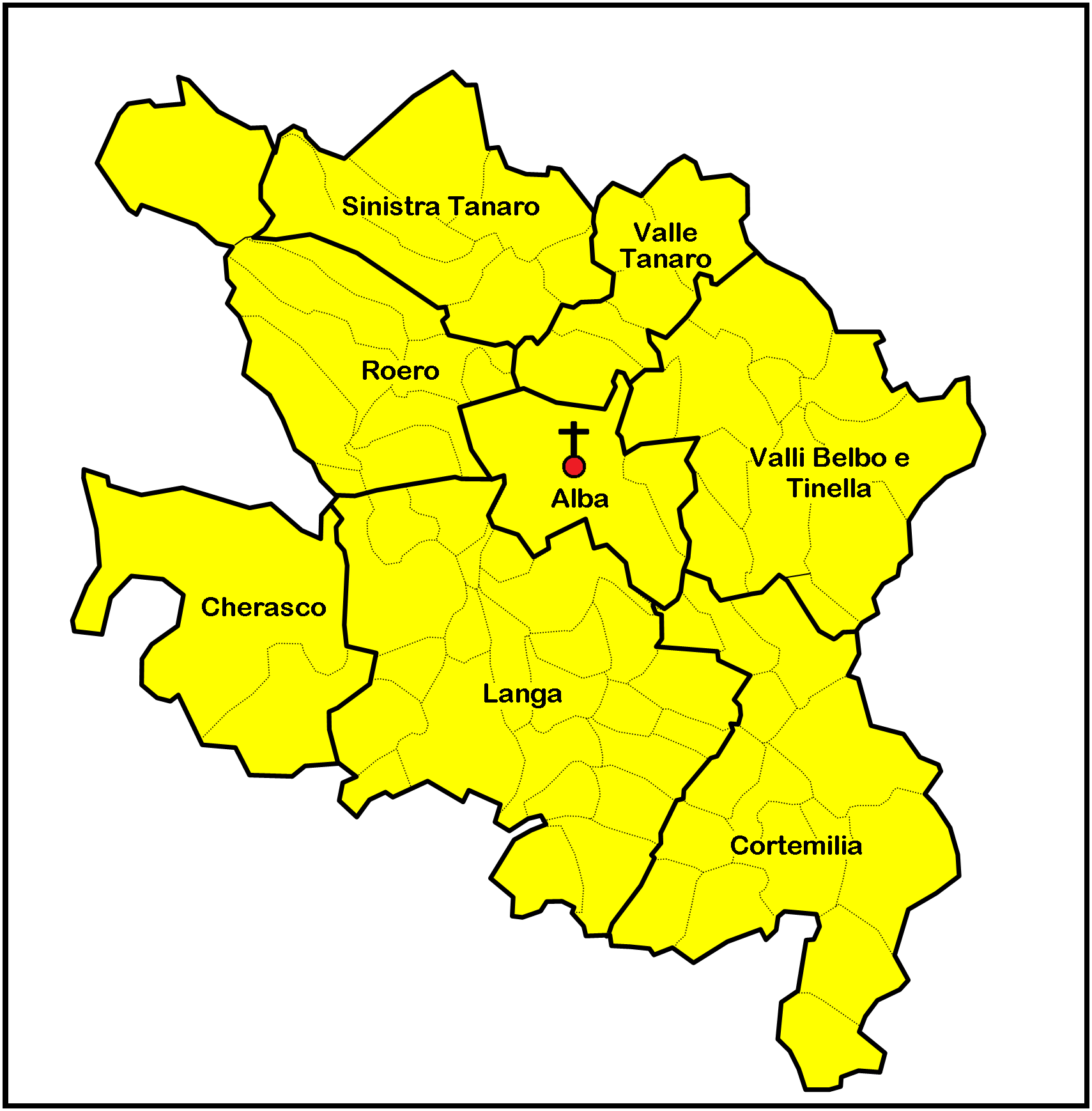 Mappa delle zone pastorali della Diocesi di Alba